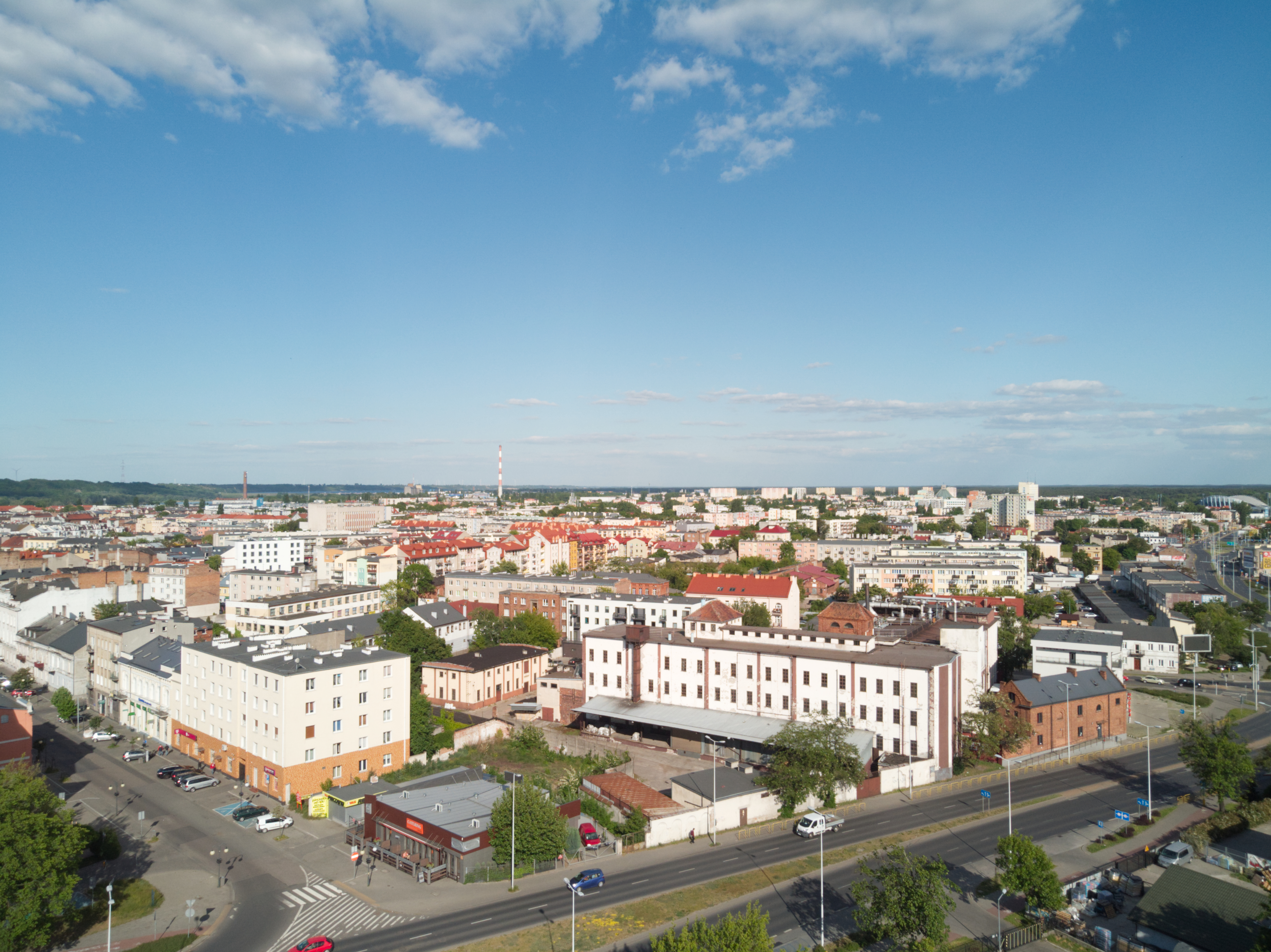 Śródmieście (2020 r.)